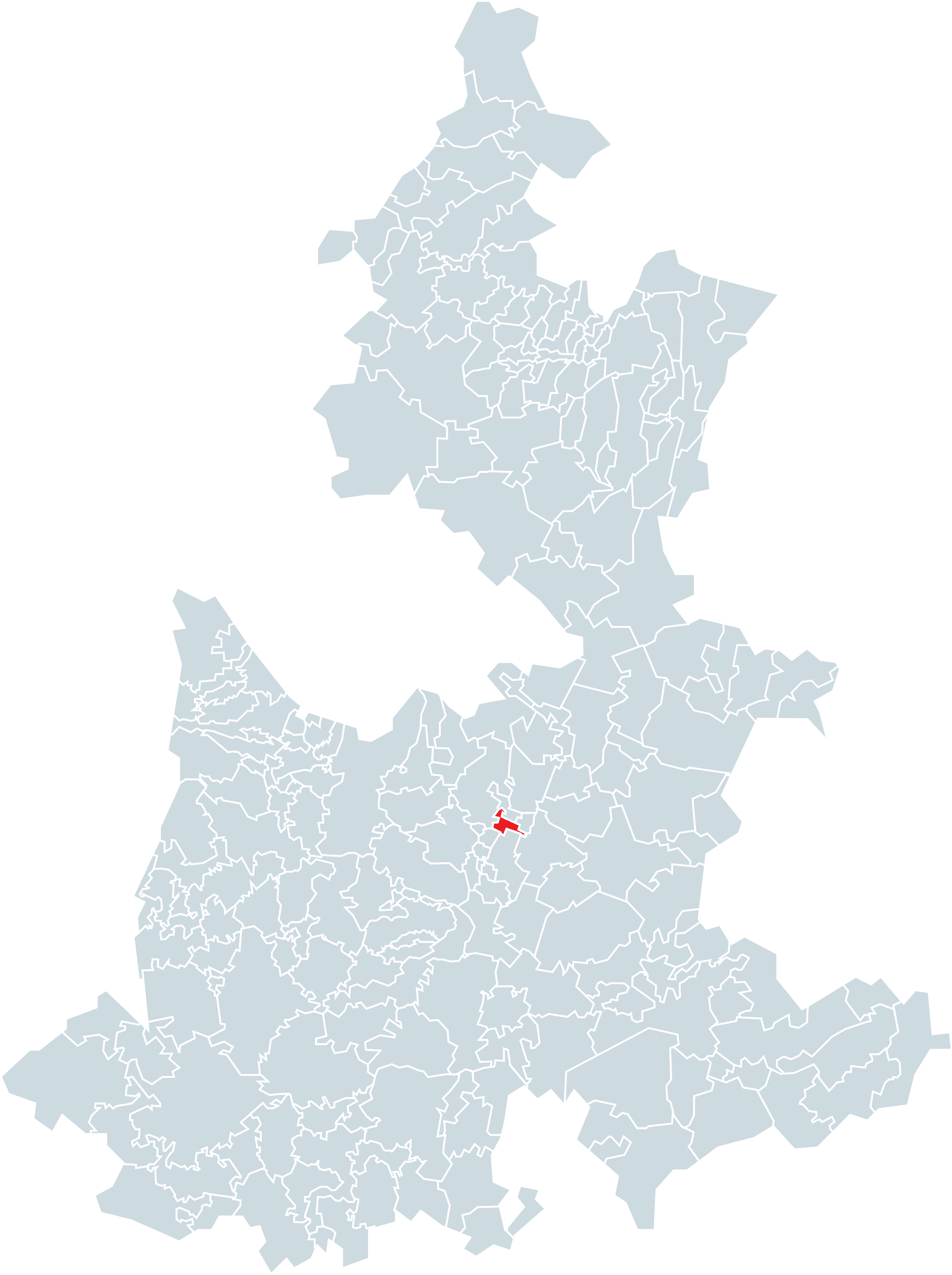 Municipio de Cuapiaxtla